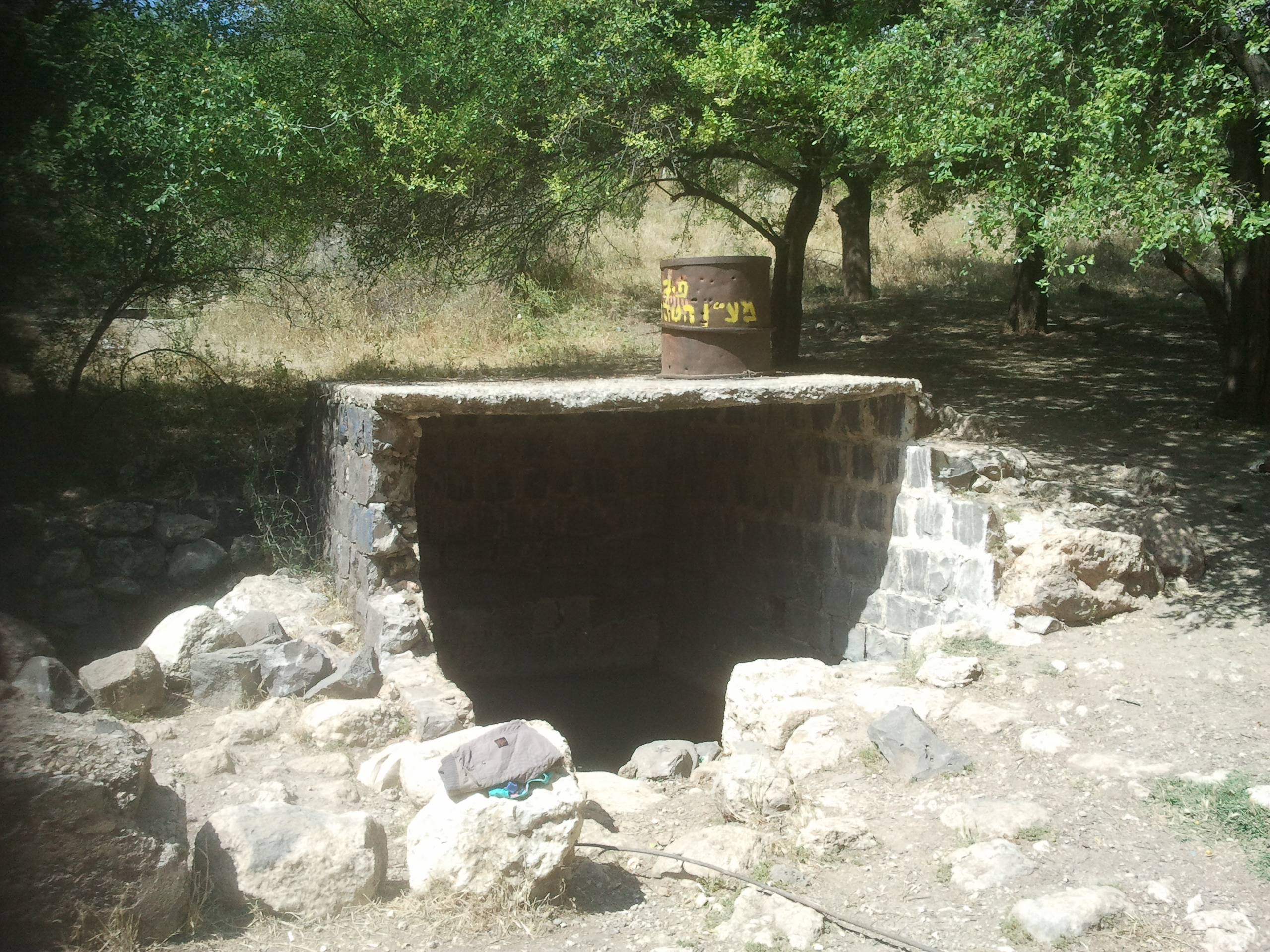 עין חקוק, מעיין ששימש את הכפר היהודי מימי המשנה והתלמוד חוקוק, ואת הכפר הערבי יקוק ששכן על שרידי היישוב העתיק נמצא בגליל בקרבת כביש 65